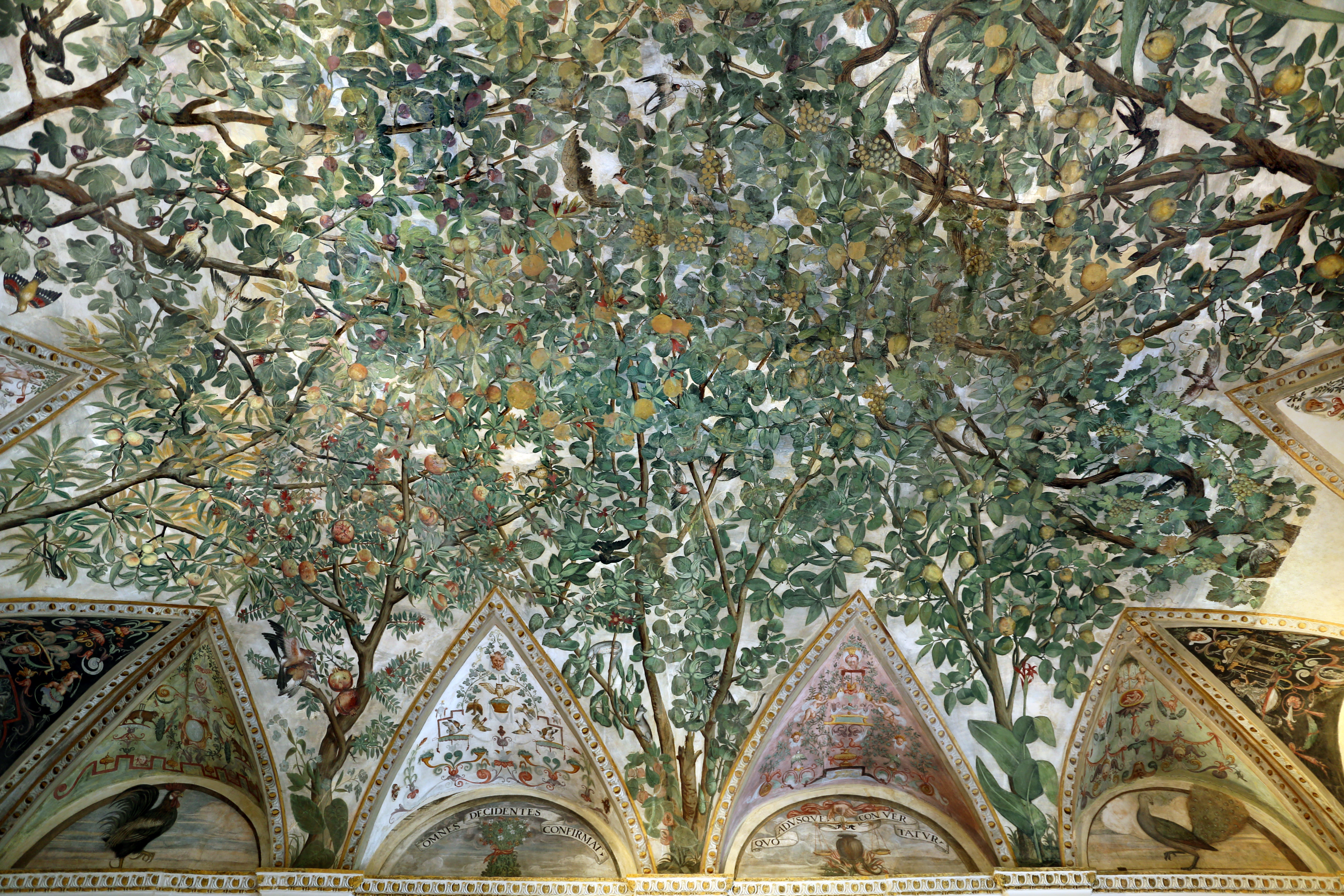 Palazzo Grimani (Castello) This is a photo of a monument which is part of cultural heritage of Italy.